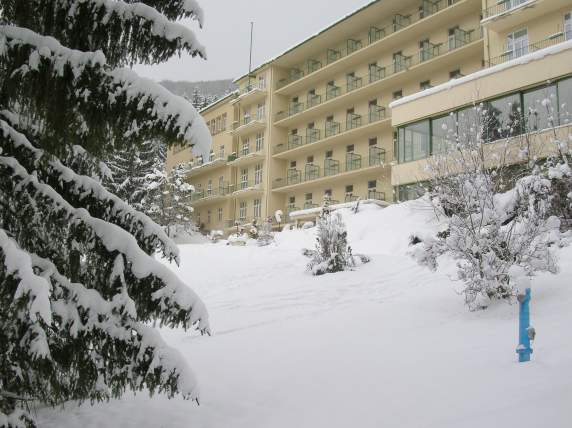 Sanatorium Wienerwald, Winteraufnahme 2007